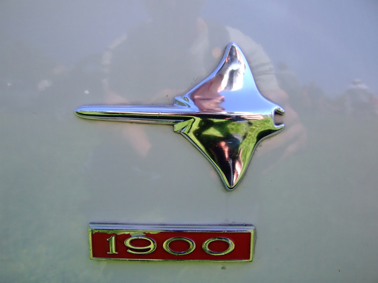 Quelle: selbst fotografiert, 06/2007 Fotograf: Späth Chr.